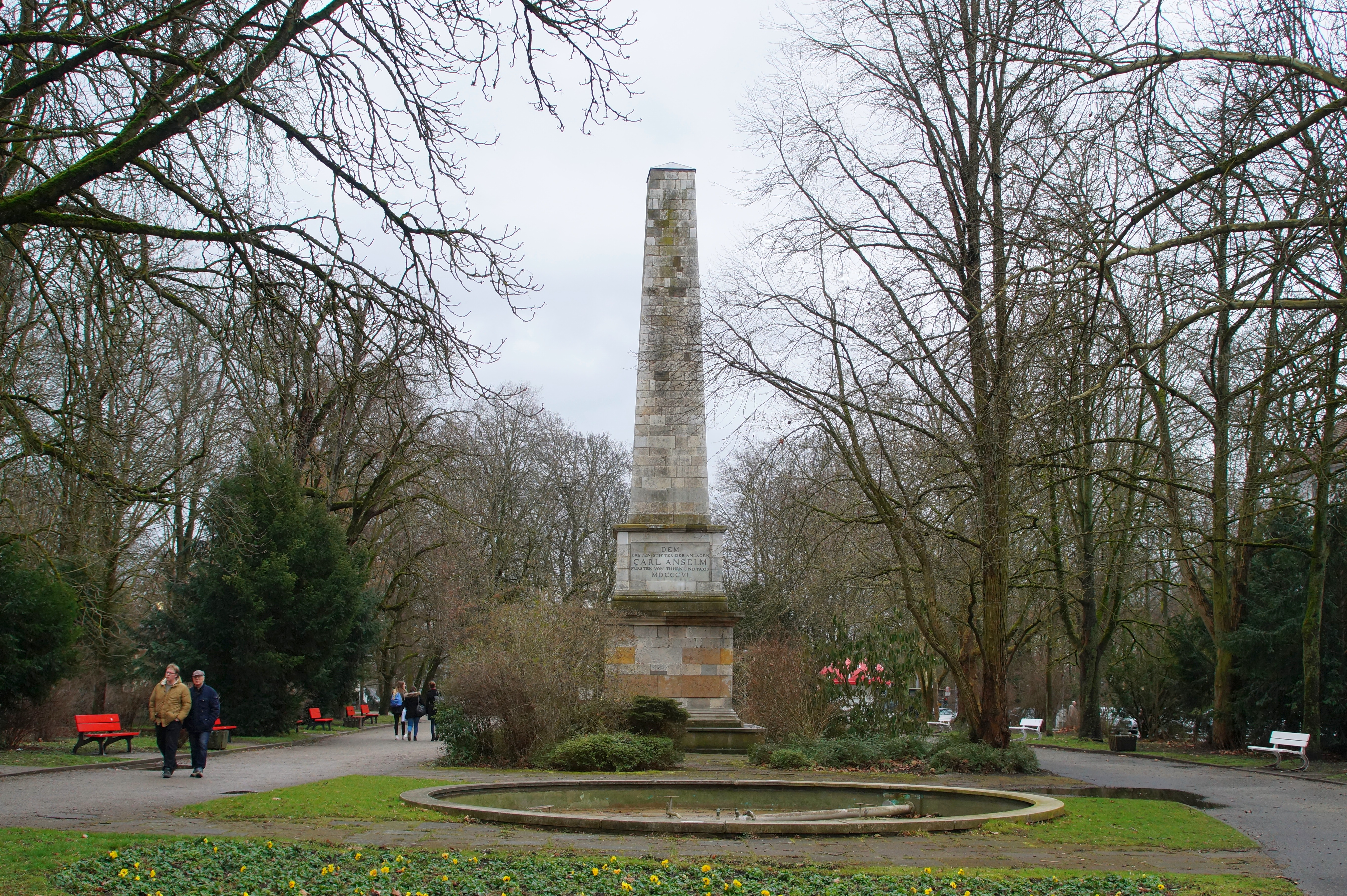 Regensburg Denkmal für Carl Anselm von Thurn und Taxis, den Initiator der Allee; entstanden um 1805, Baumeister Herigoyen im Auftrag von Fürstprimas Dalberg.